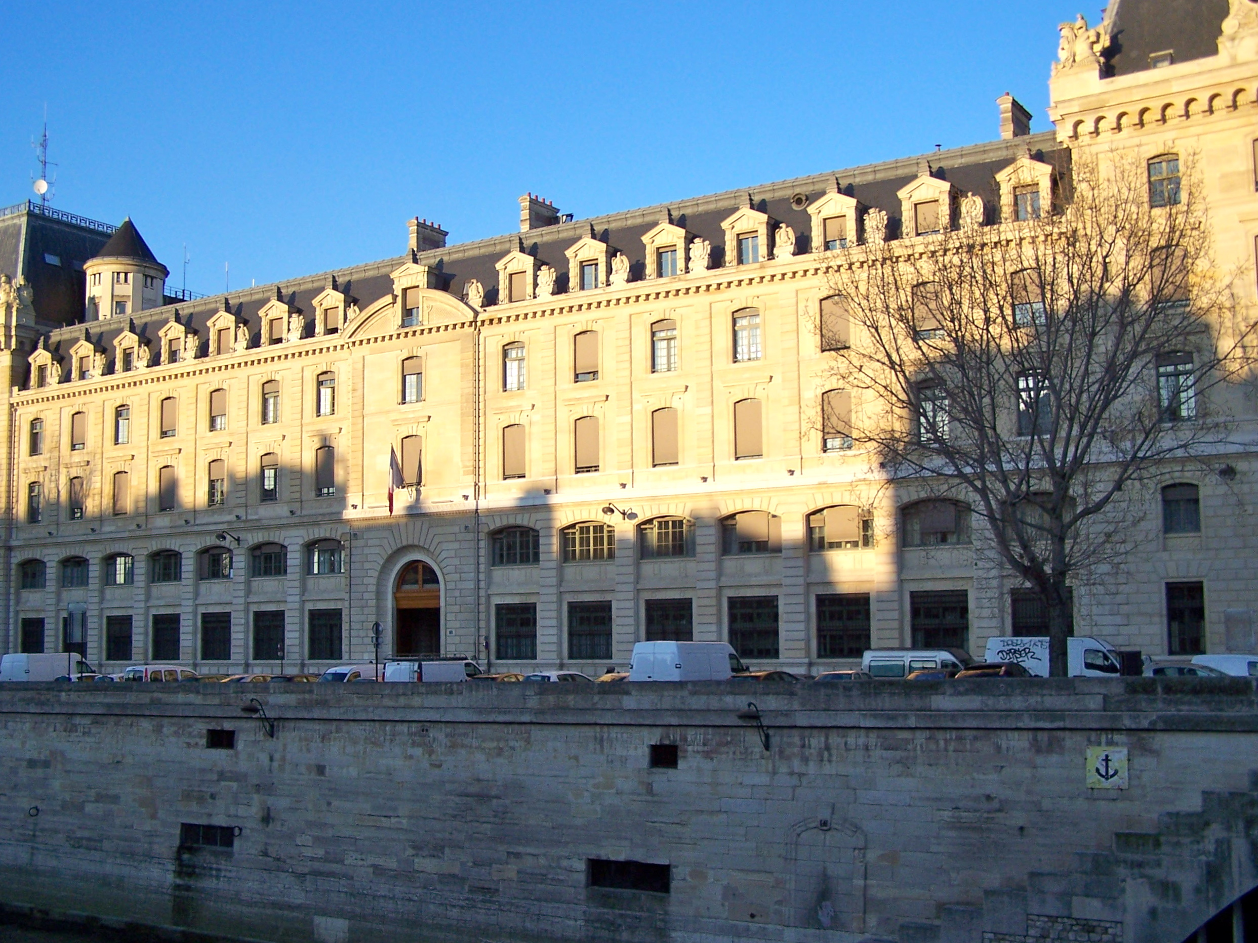 Vue de la préfecture de police de Paris sur son côté donnant sur le quai du Marché-Neuf.